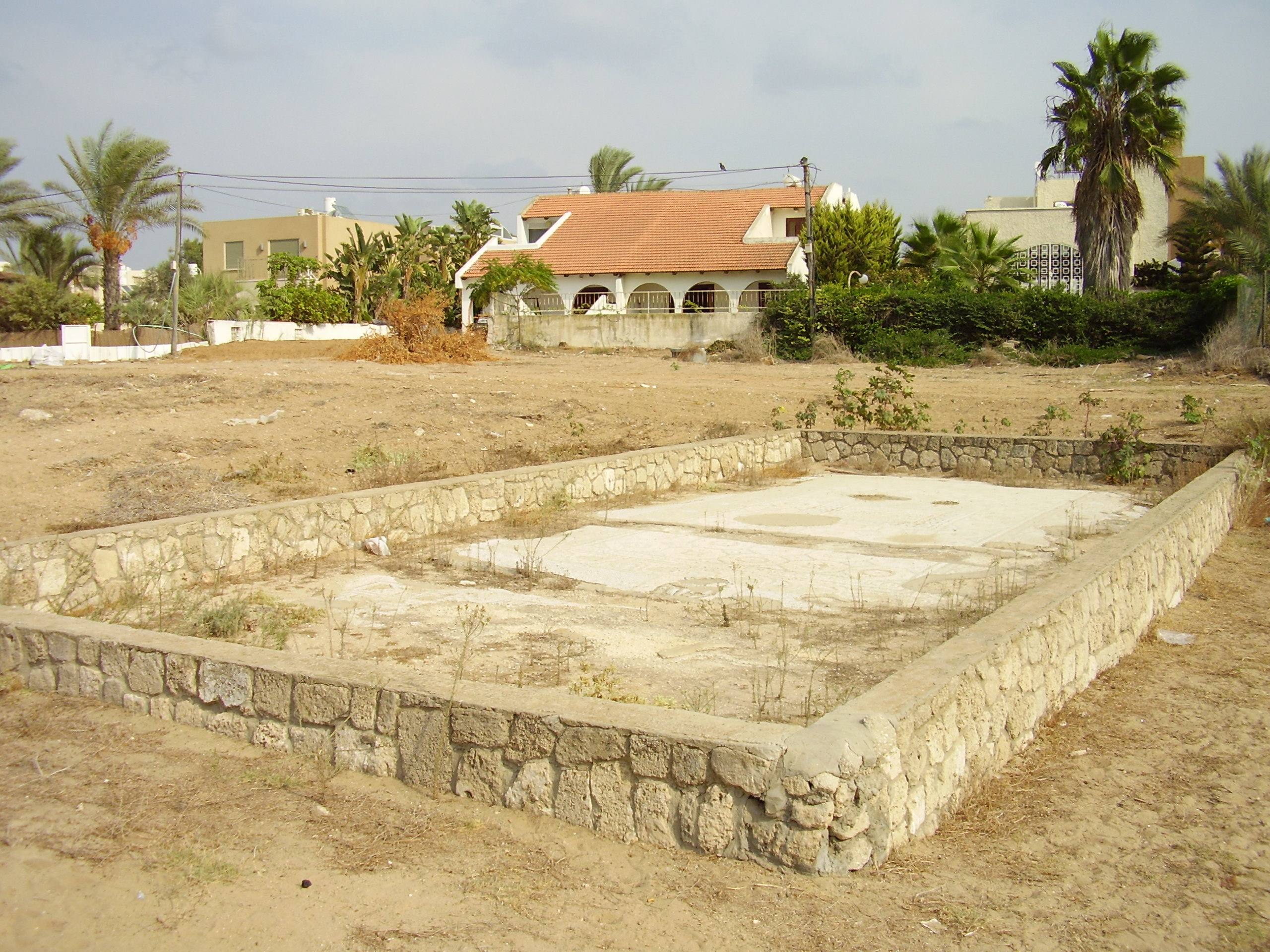 רצפת פסיפס ברחוב יקותיאל אדם בשכונת ברנע באשקלון שנחשפה על ידי רשות העתיקות בשנת 1967. שייכת לסיטרה הצפונית של כנסייה מהתקופה הביזנטית שנמצאה במקום.